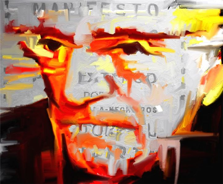 José Sobral de Almada Negreiros em pintura de Bottelho. Almada Negreiros (1893 — 1970) foi um artista multidisciplinar, pintor, escritor, poeta, ensaísta, dramaturgo e romancista português ligado ao grupo modernista. Também foi um dos principais colaboradores da Revista Orpheu.